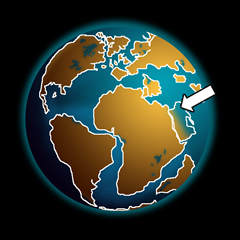 Ubicacion del observador del Génesis en la deriva continental paso 2